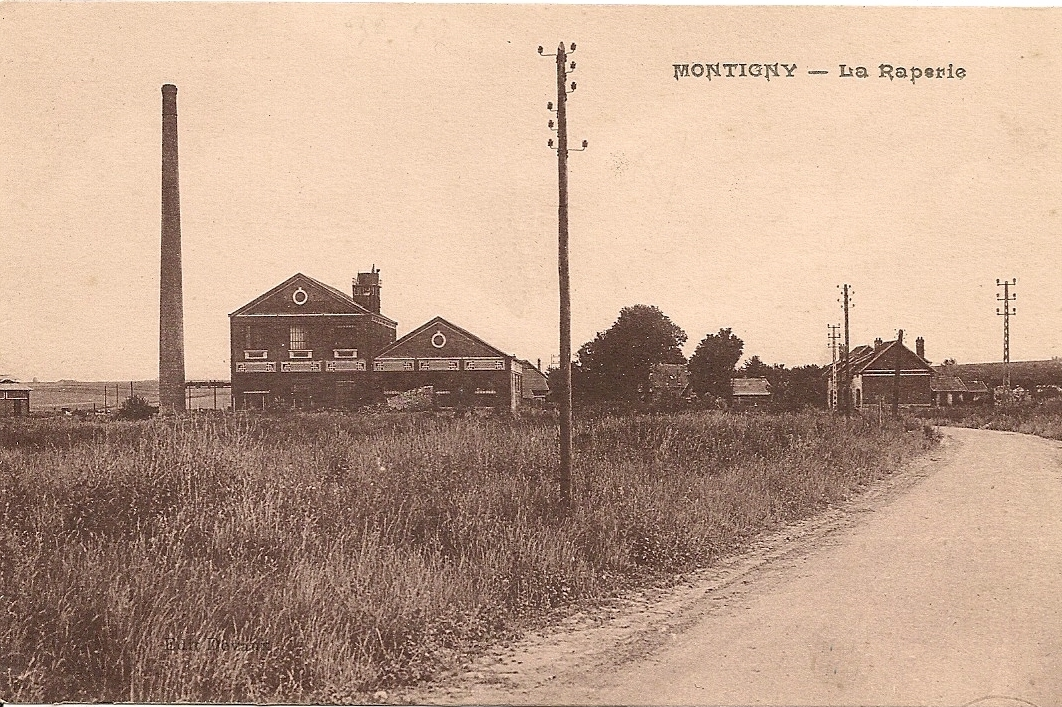 La râperie